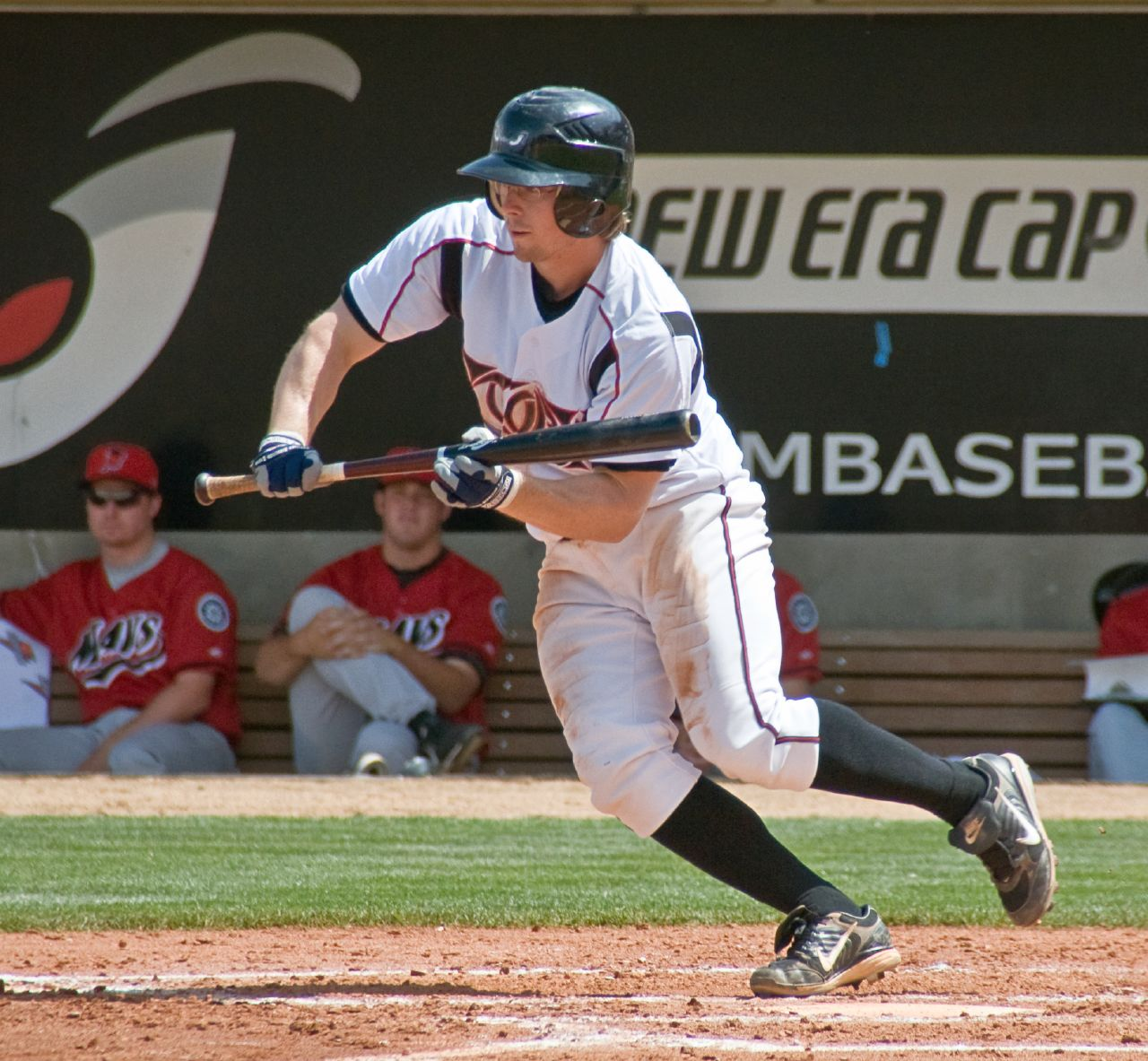 Eric Sogard